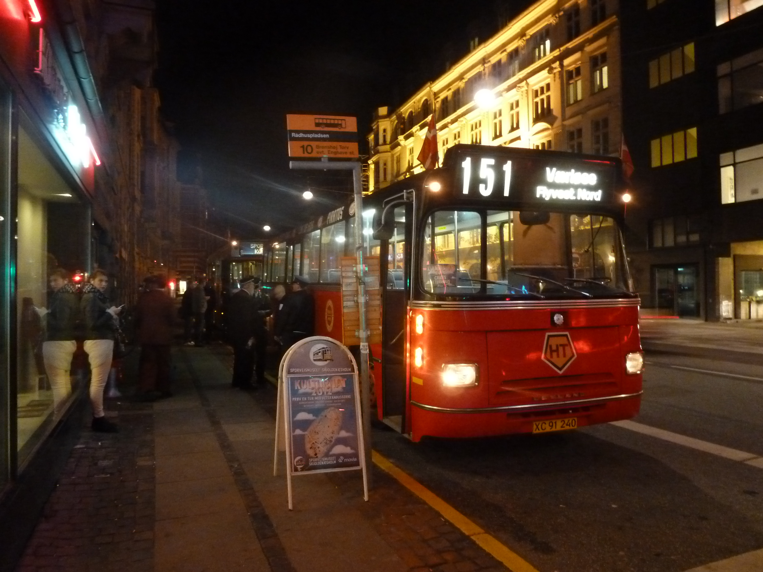 Former HT 3078, now belonging to Sporvejsmuseet Skjoldenæsholm, as Kulturnatbus in Vester Voldgade in Copenhagen.